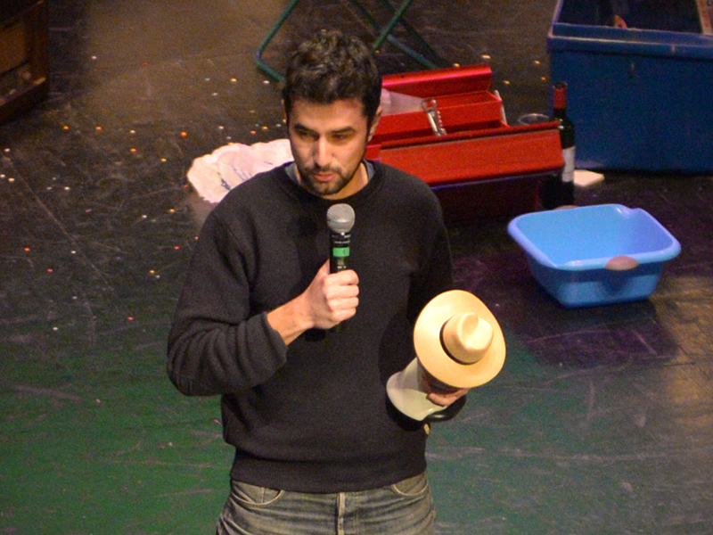 Florent Chavouet au Festival International de la BD d'Angoulême 2015.